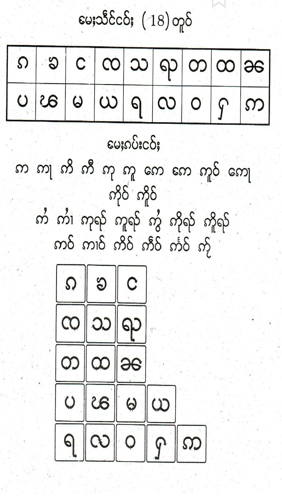 ရှမ်းဗျည်းနှင့် သရများ